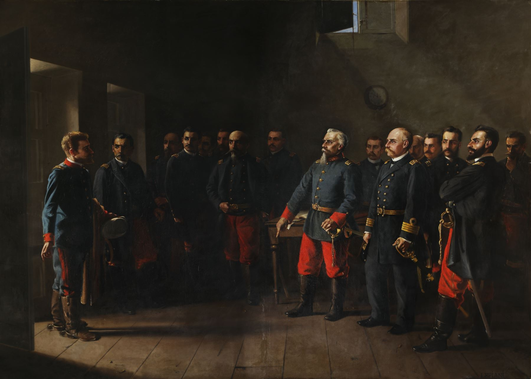 Óleo de Juan Lepiani (1864-1932) que representa al coronel Francisco Bolognesi, junto a su estado mayor en Arica, el 5 de junio de 1880, respondiendo negativamente a la oferta de rendición del parlamentario chileno Juan de la Cruz Salvo.